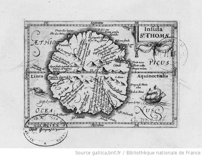 Insula St. Thomae / [Langenes]- Jodocus Hondius (Amsterdam)